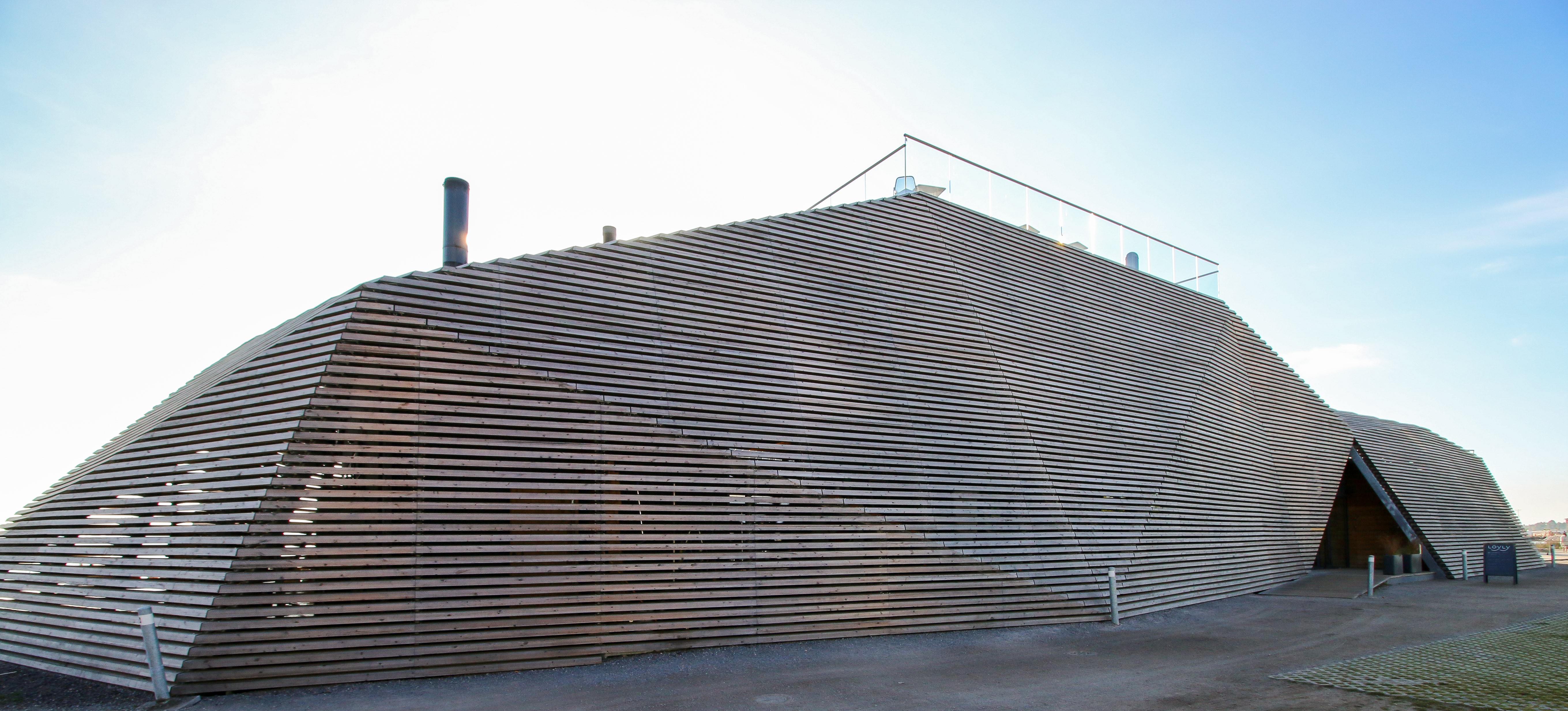 Löylyn sisäkatot, saunatiloja lukuun ottamatta, ovat Inlookin rakentamia.